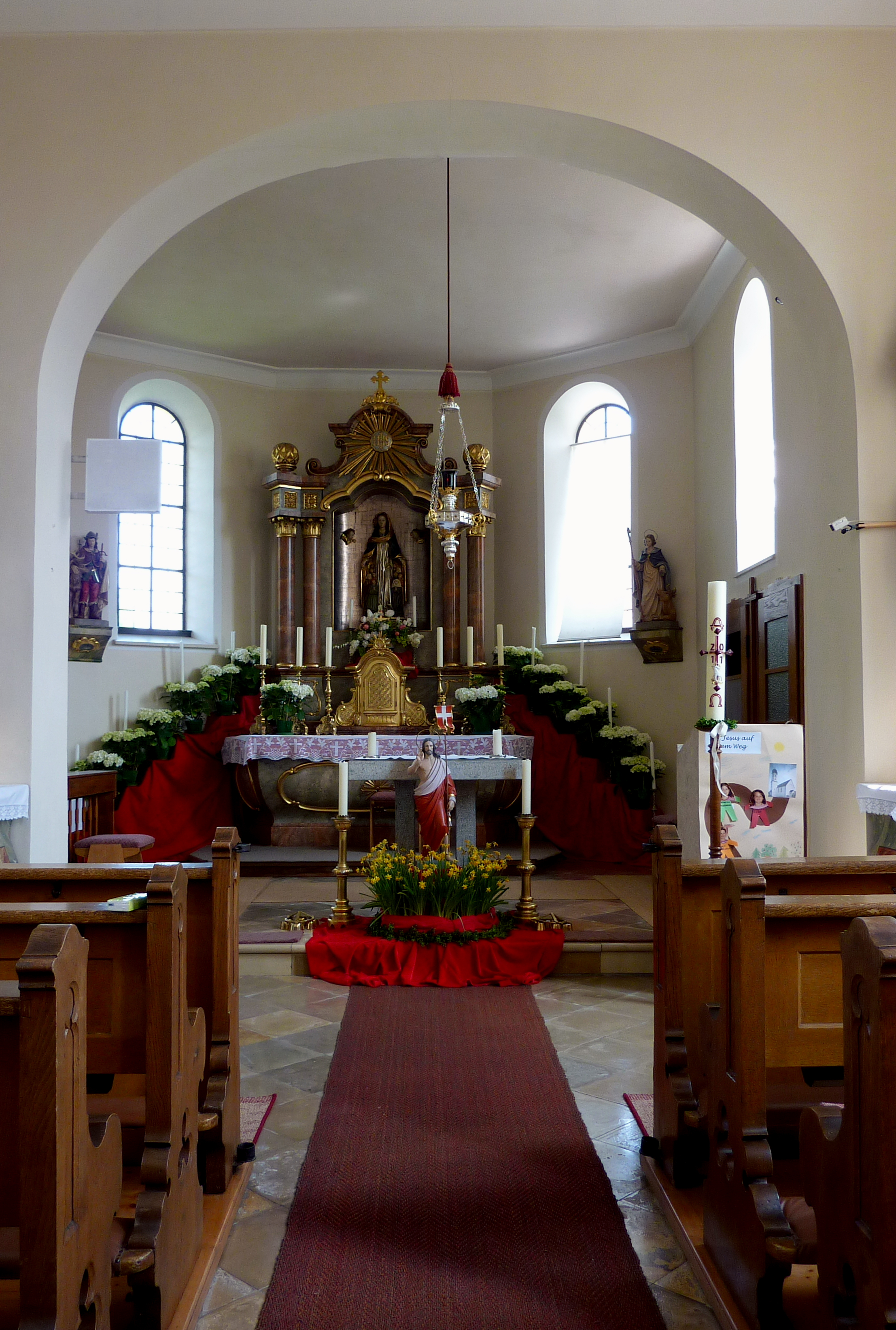 Katholische Filialkirche St. Veit in Veitriedhausen, einem Stadtteil von Lauingen im Landkreis Dillingen an der Donau (Bayern), Innenraum